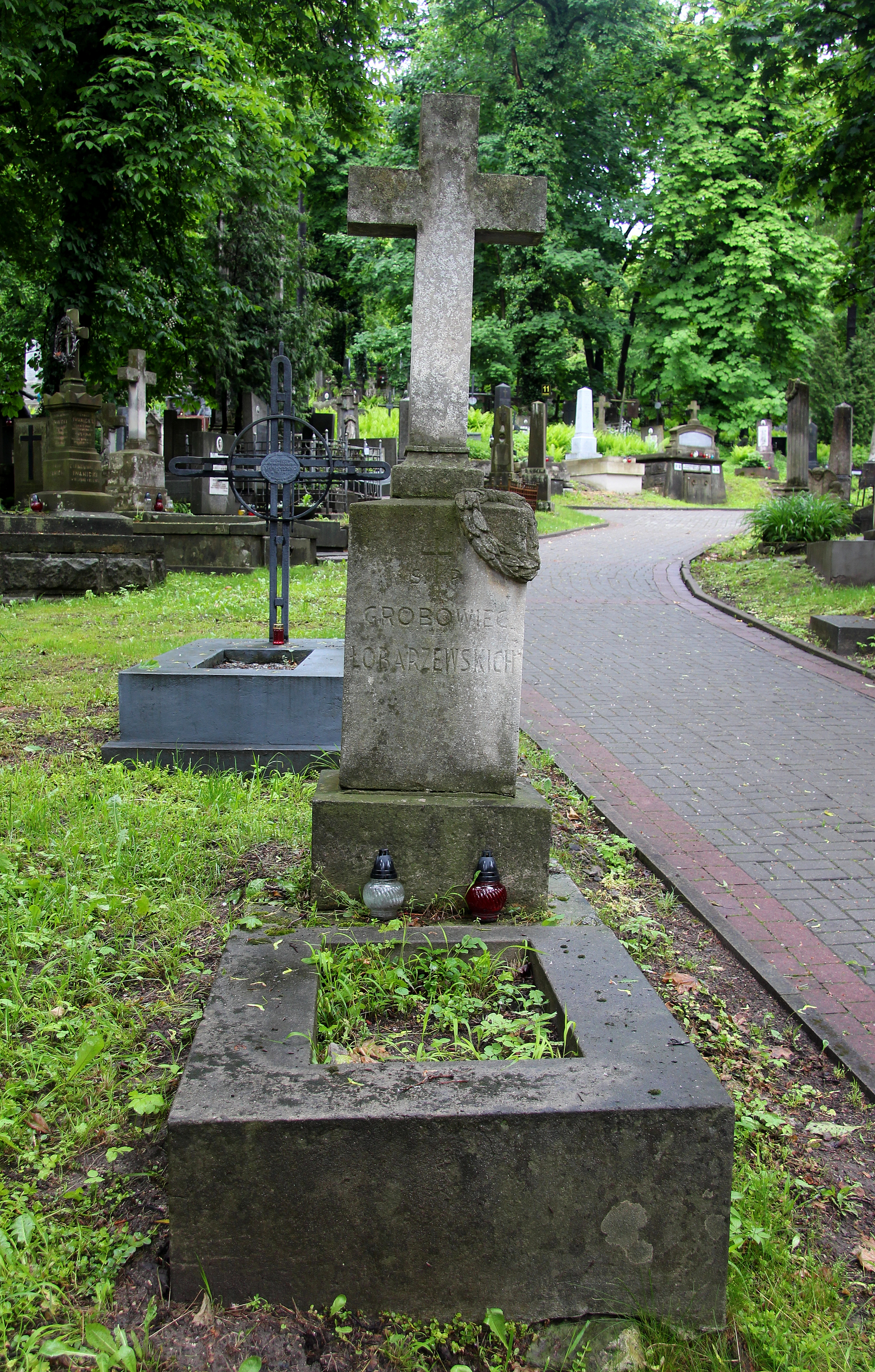 Гріб родини Лобажевських. Личаківський цвинтар , поле № 5.